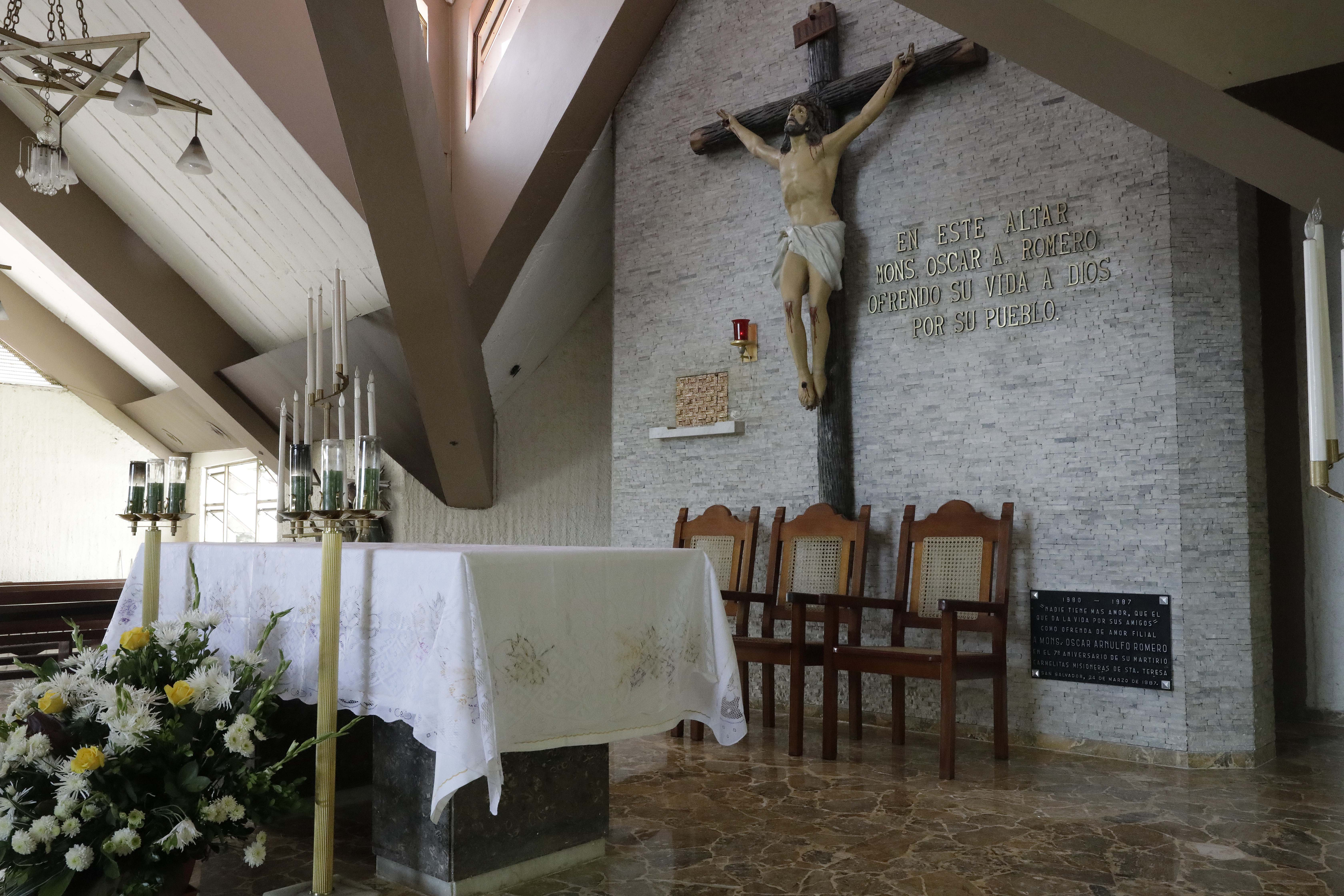 Canonización Monseñor Romero--San Salvador.